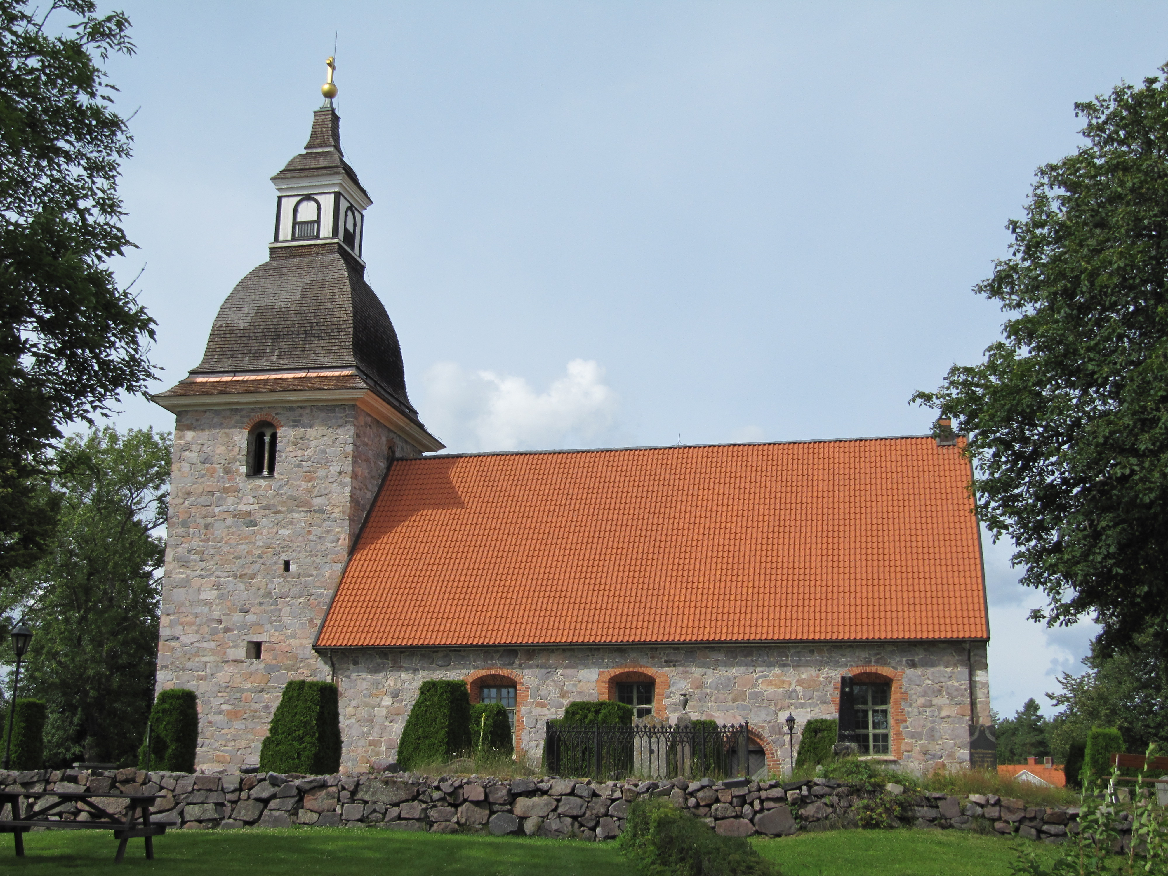 Törnsfalls kyrka